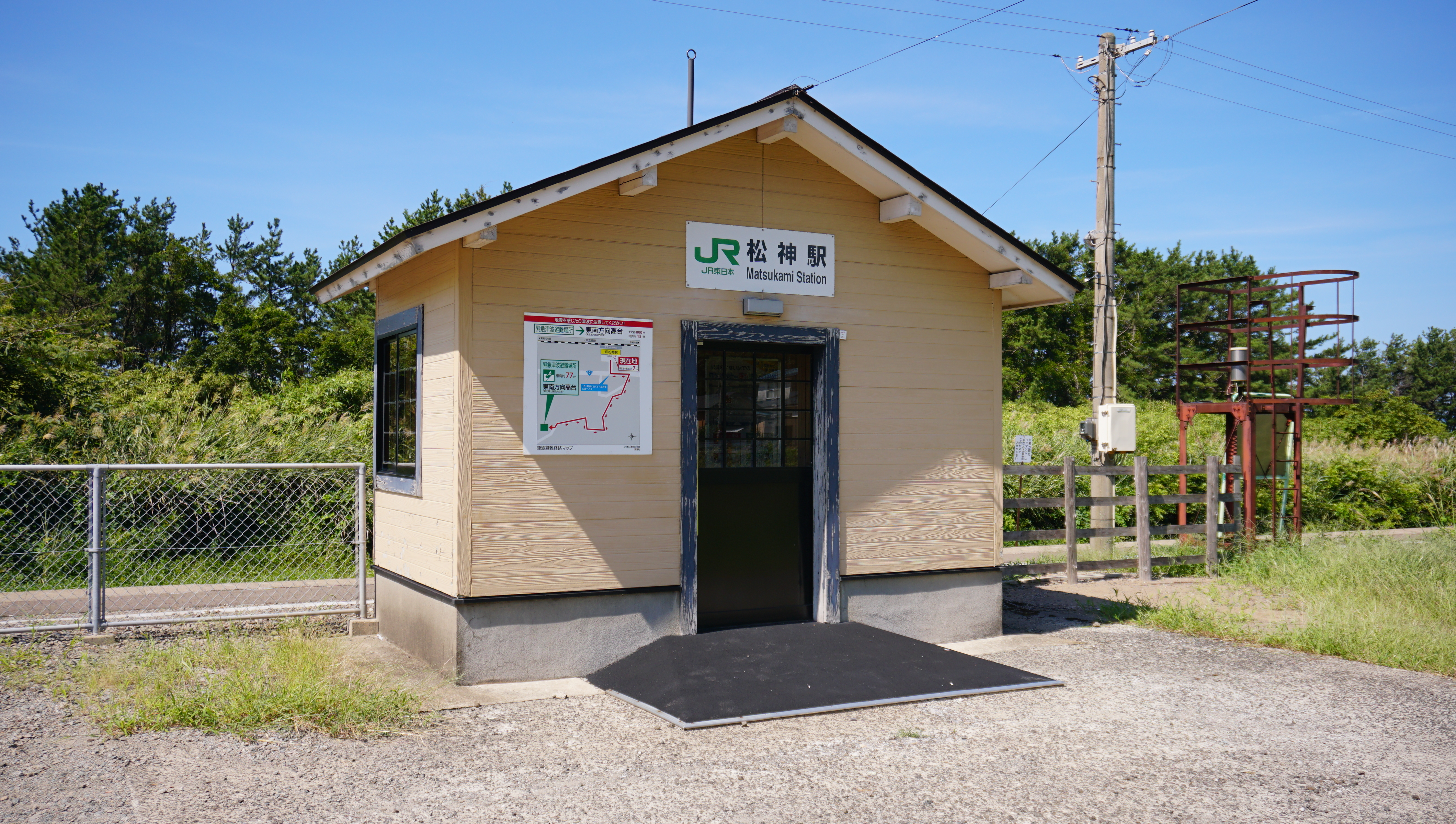 五能線 松神駅（青森県西津軽郡深浦町）